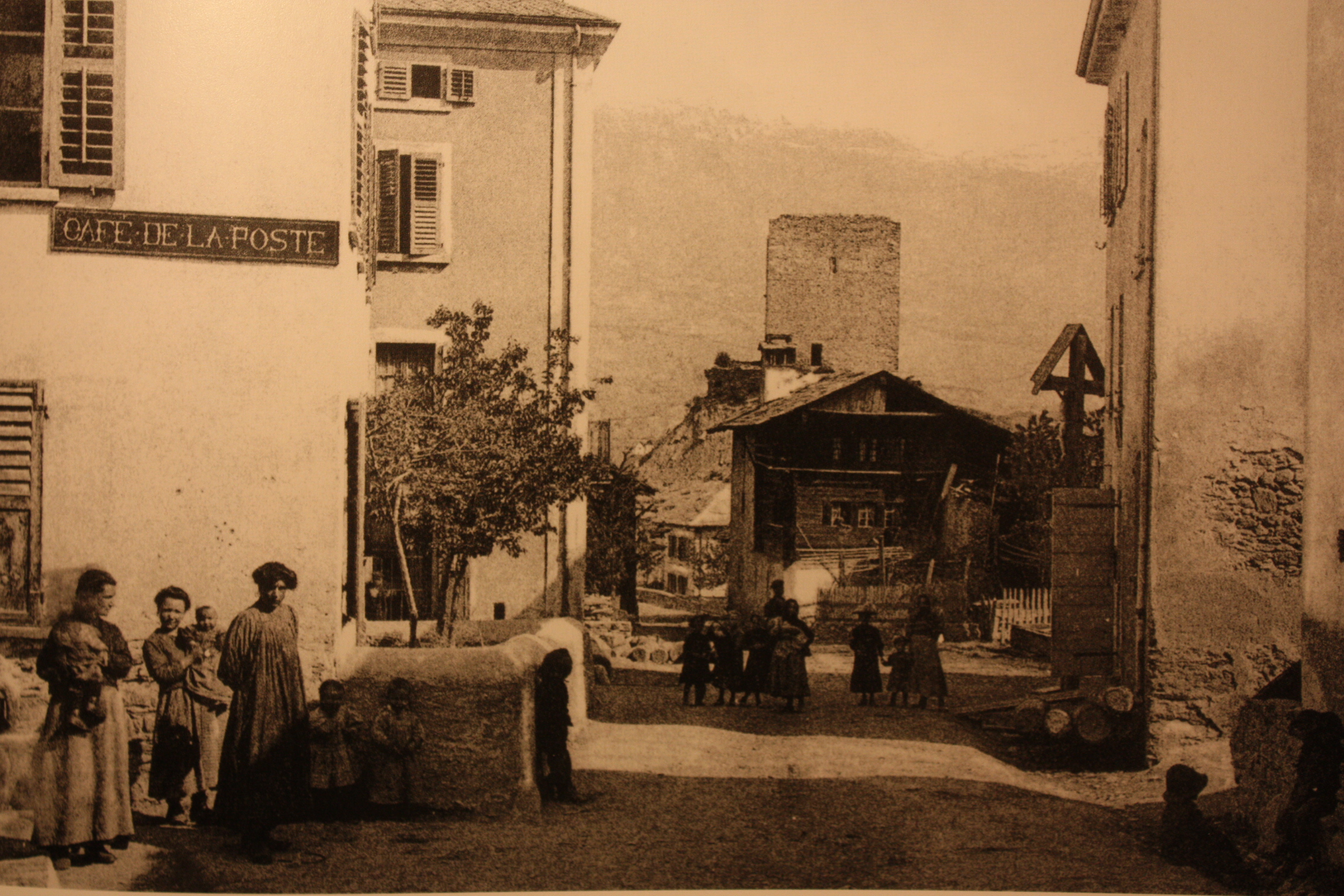 Rue de la Poste à Chalais (Suisse) en 1927, avec en arrière-plan la tour de Chalais avant l'effondrement du plan nord de celle-ci en 1936.